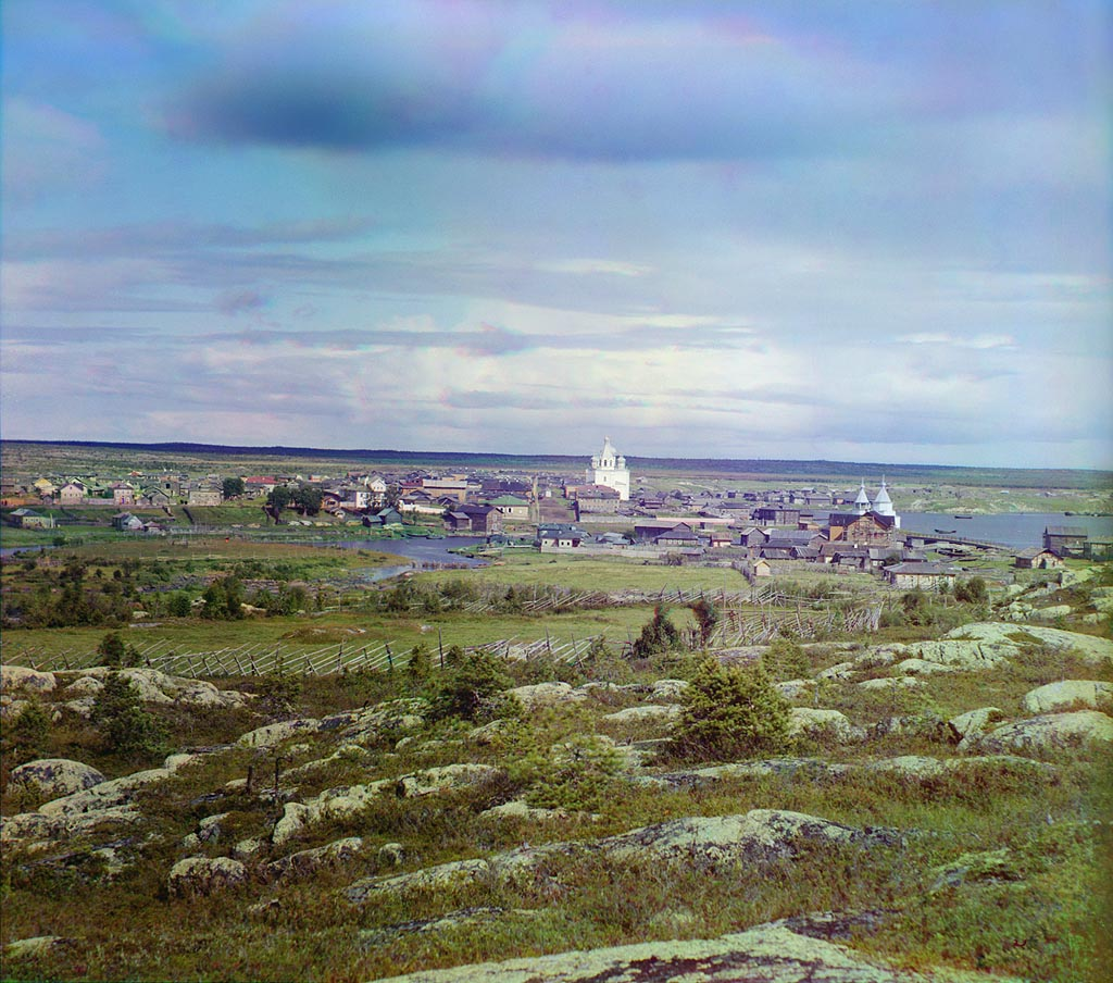 Кемь. Общий вид. [1916 год]